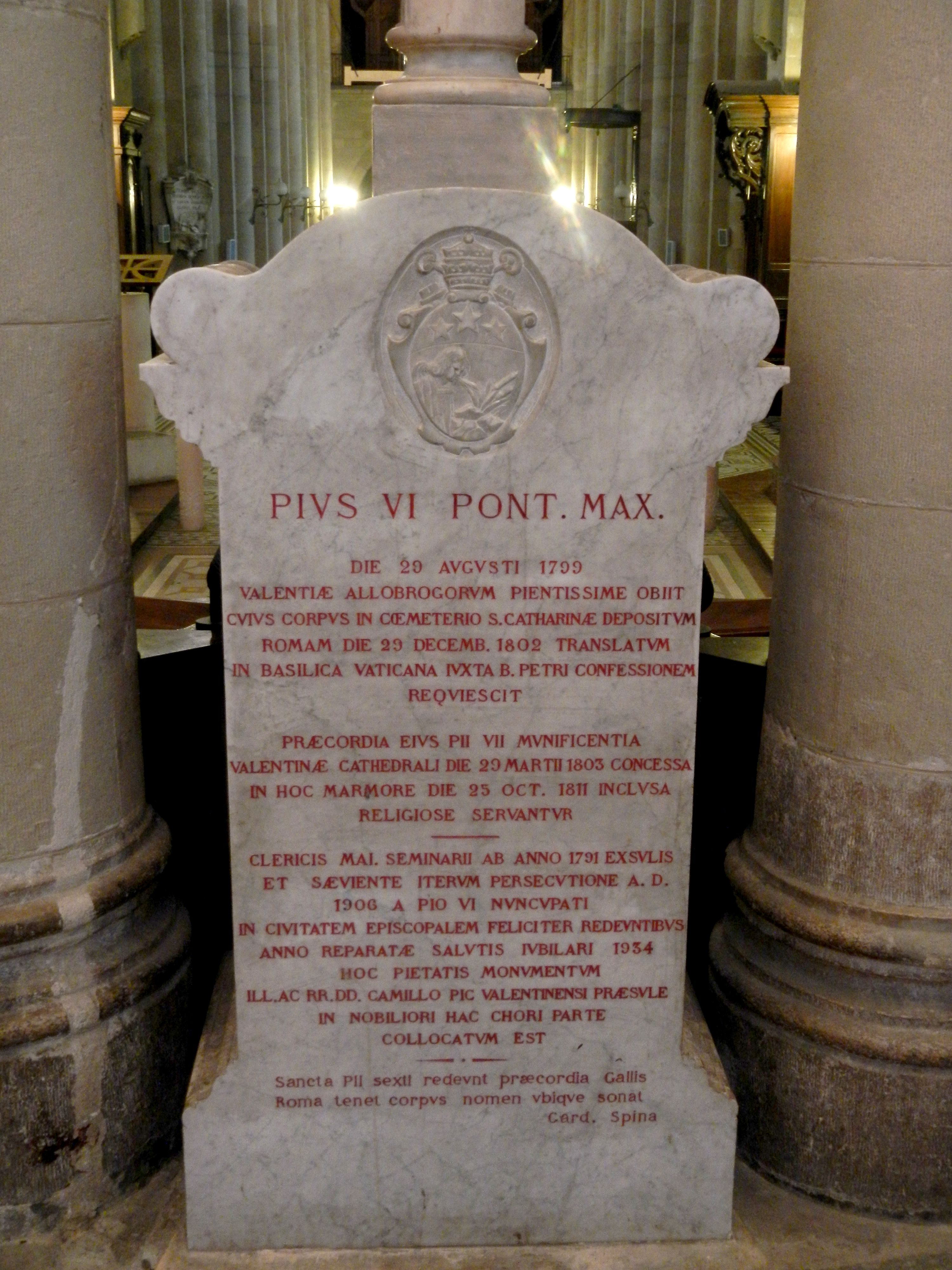 Büste des Papstes Pius VI in der Kathedrale von Valence, Hinterseite.